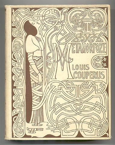 bandontwerp Jan Toorop 1897, "Metamorfoze", uitgever : L.J. Veen